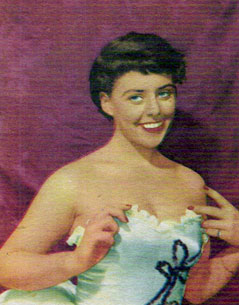 Yvonne Lombard